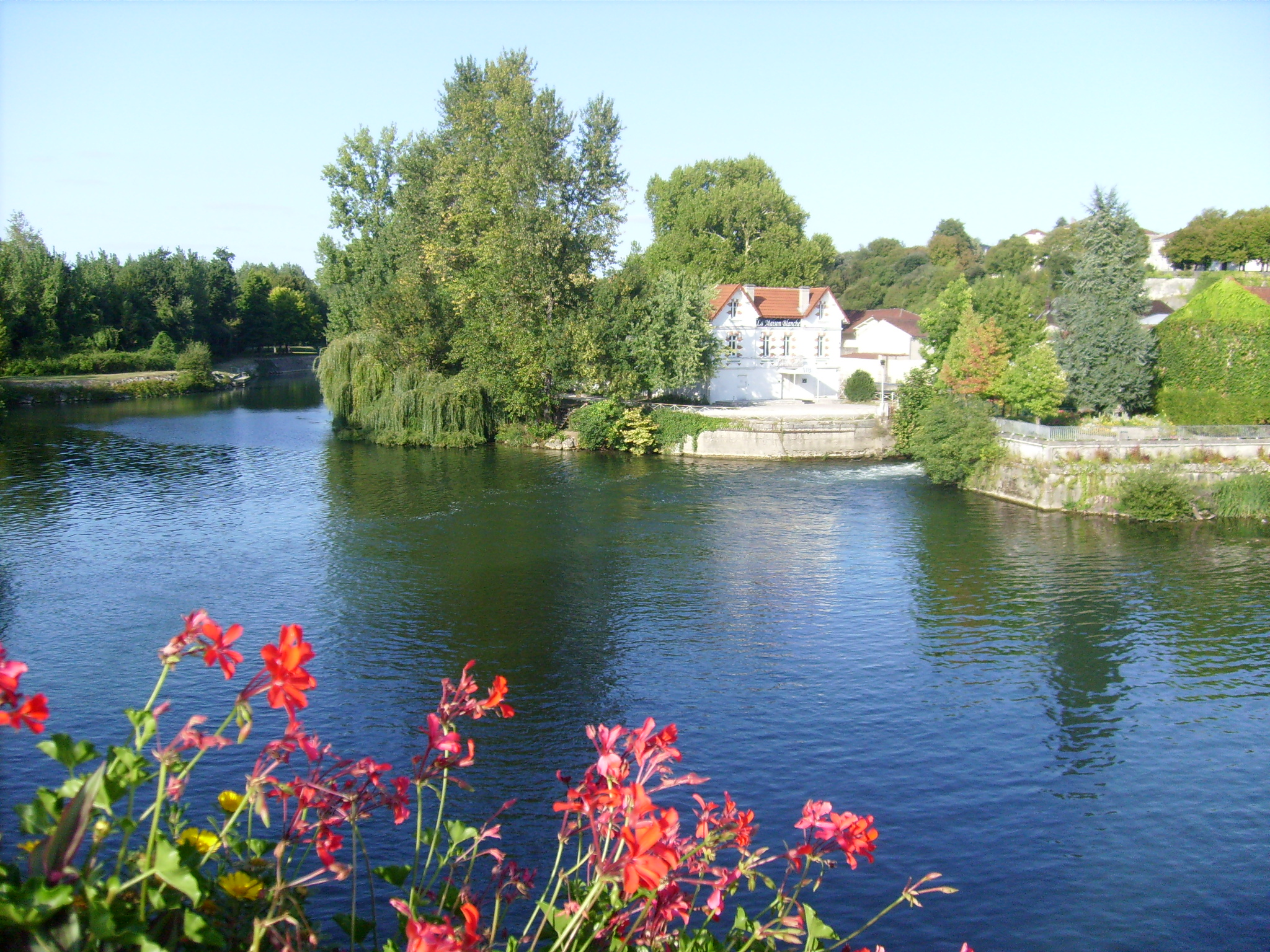 La Charente à Cognac